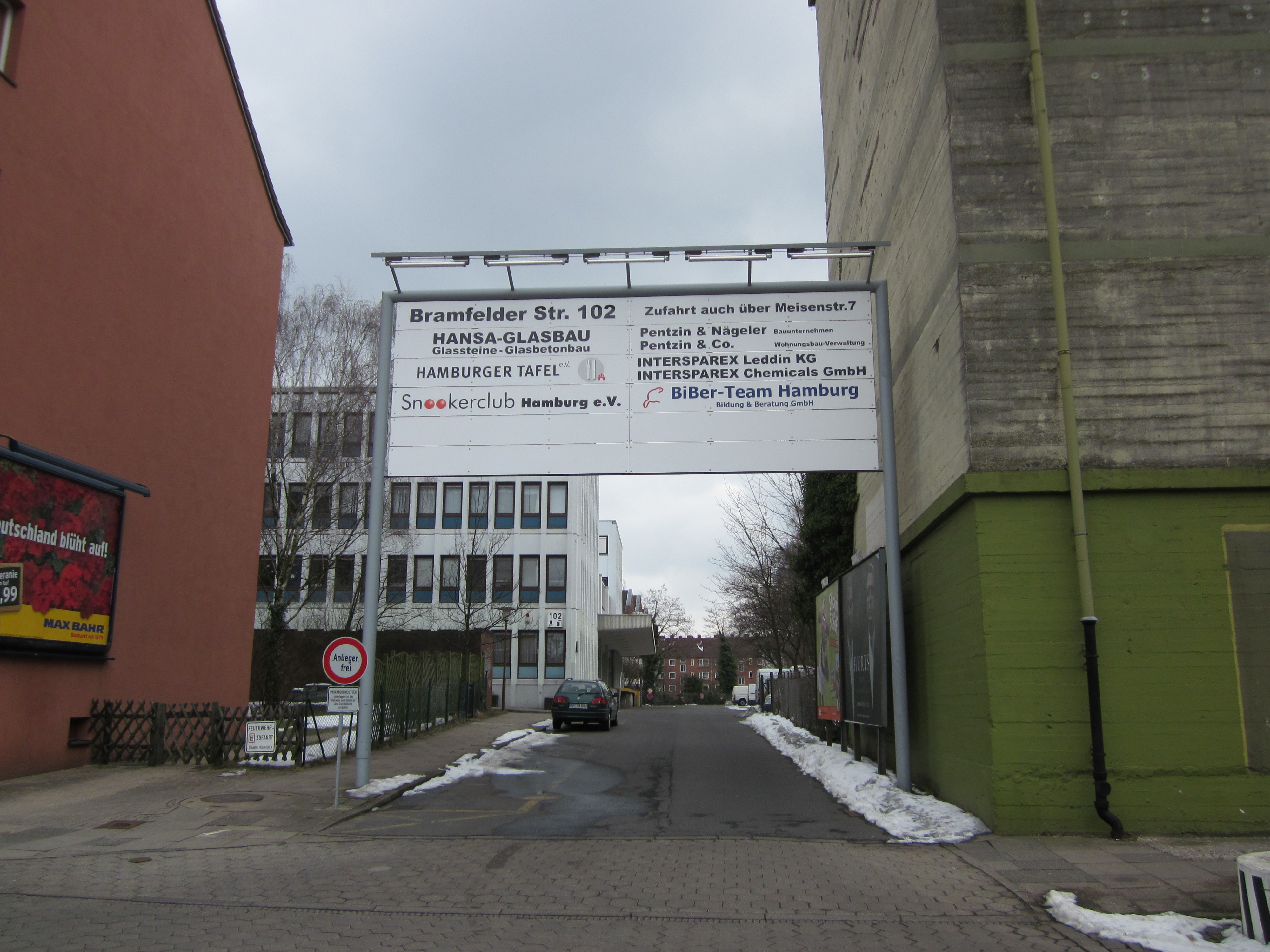 Der Gewerbehof zwischen der Bramfelder Straße 102 und der Meisenstraße 7 in Barmbek-Nord gehört zu einem größeren Gewerbegebiet, das sich gemäß Bebauungsplan Barmbek-Nord 18 vom 2. März 1970 von hier an beiden Straßen nach Norden bis zur Einmündung des Amalie-Dietrich-Stieges in die Meisenstraße zieht. Außer üblichen Gewerbebetrieben befinden sich auch ein Snooker-Verein und das Lager der Hamburger Tafel auf diesem Gewerbehof.